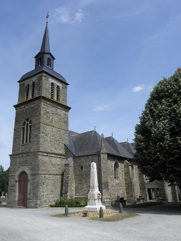 Église Saint-Martin-de-Tours d'Amanlis (35).